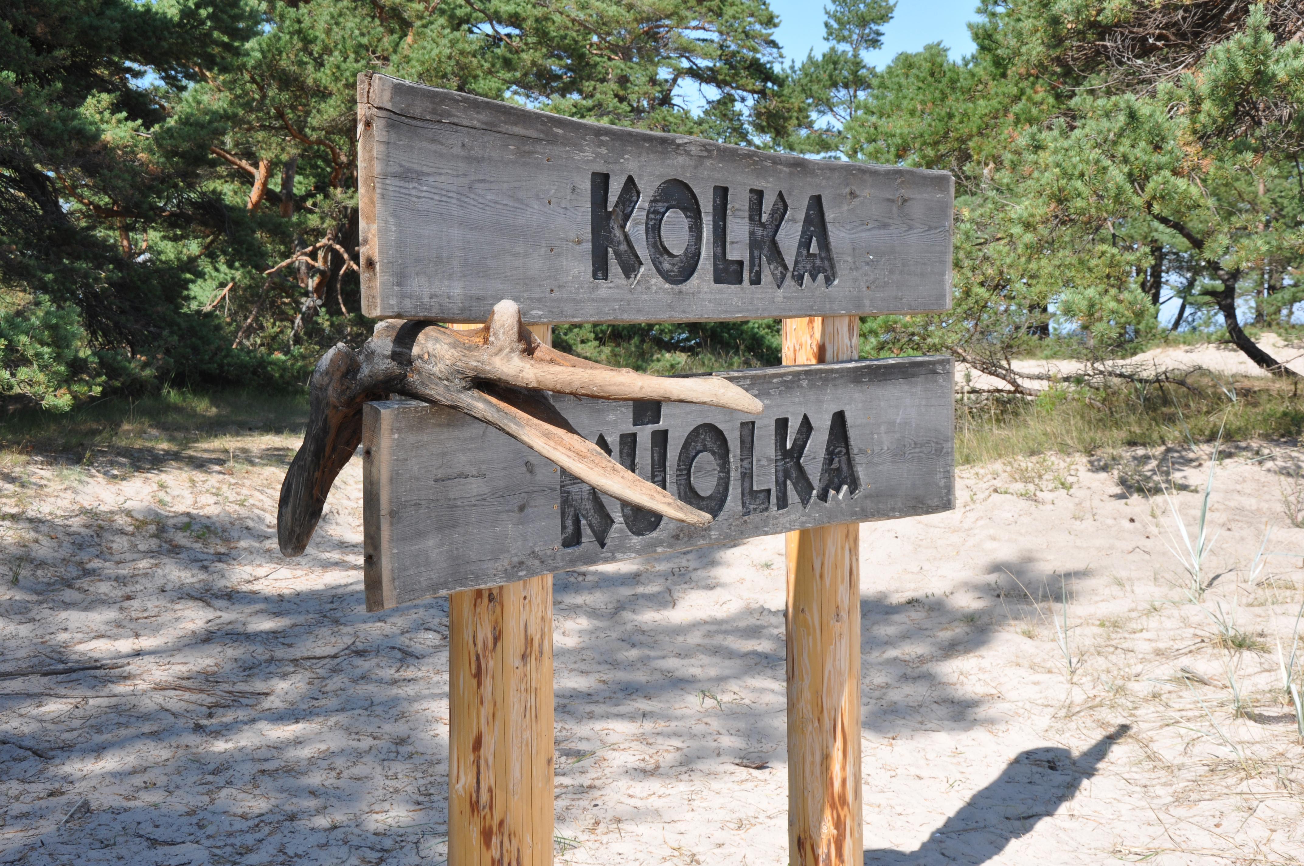 Kolkas pagasts, Dundagas novads, Latvia